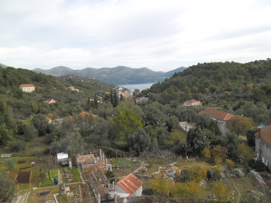 Suđurađ na otoku Šipanu